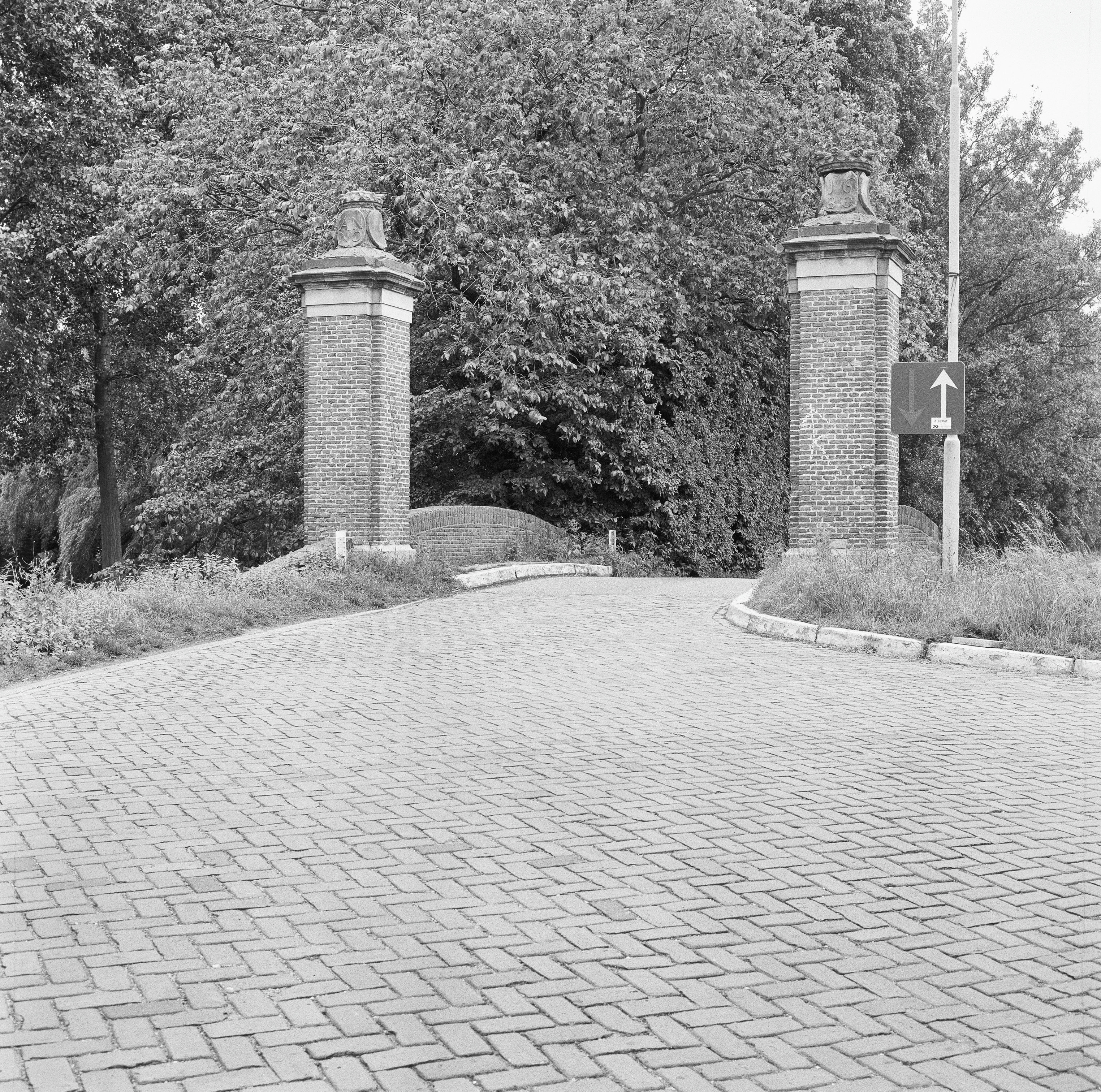 V.M. BUITENPLAATS "SION": Exterieur INRIJHEK